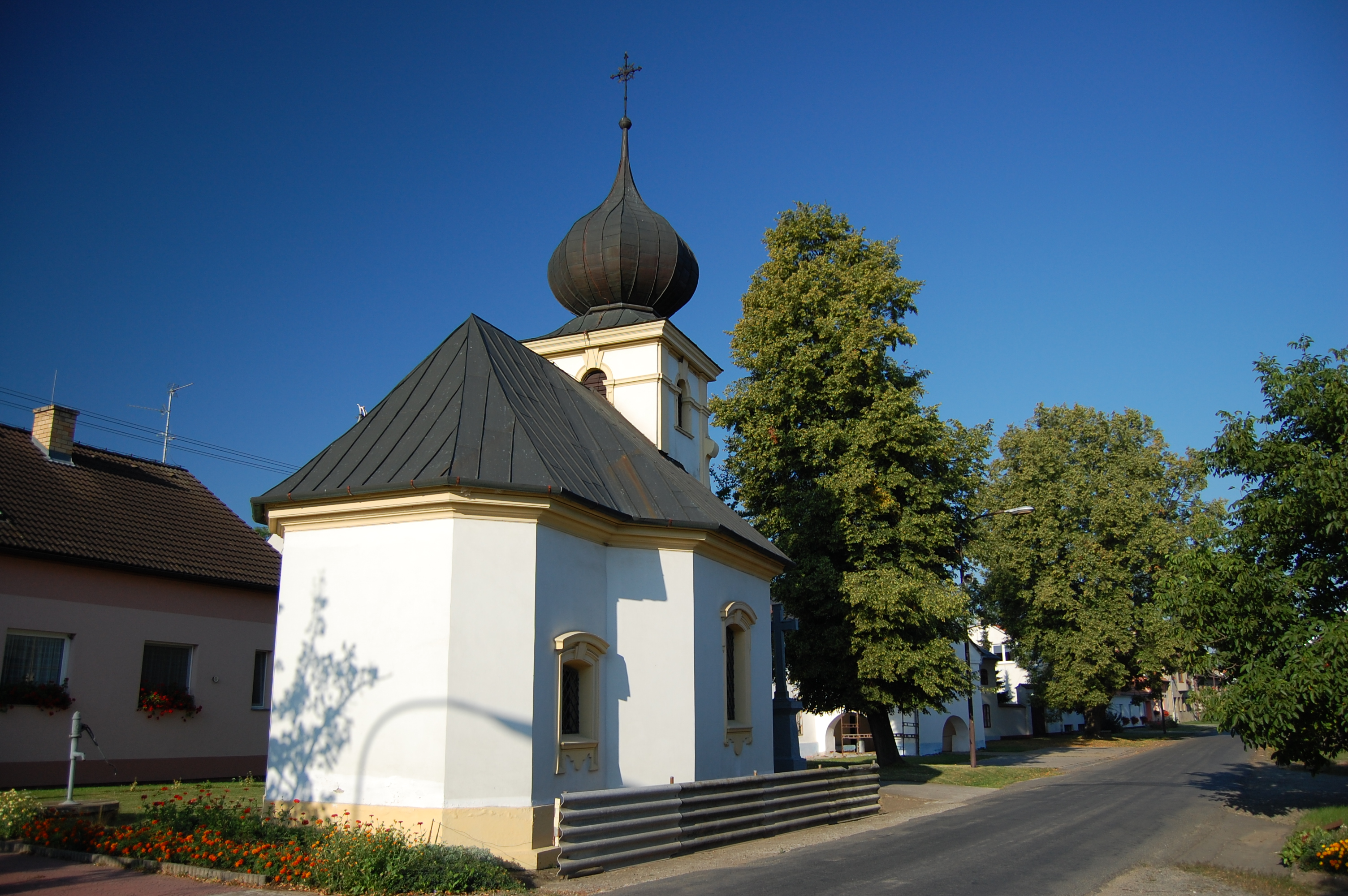 Kaple na návsi v Bílovicích, Bílovice-Lutotín, okres Prostějov